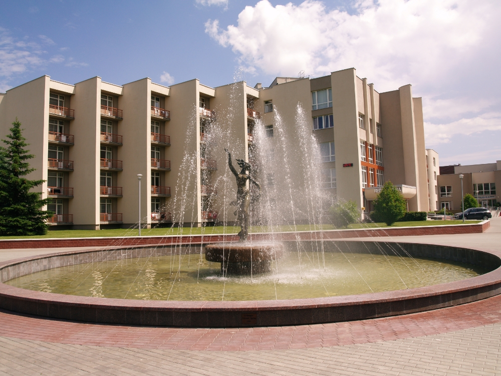 Birštono Versmės sanatorijos fontanas